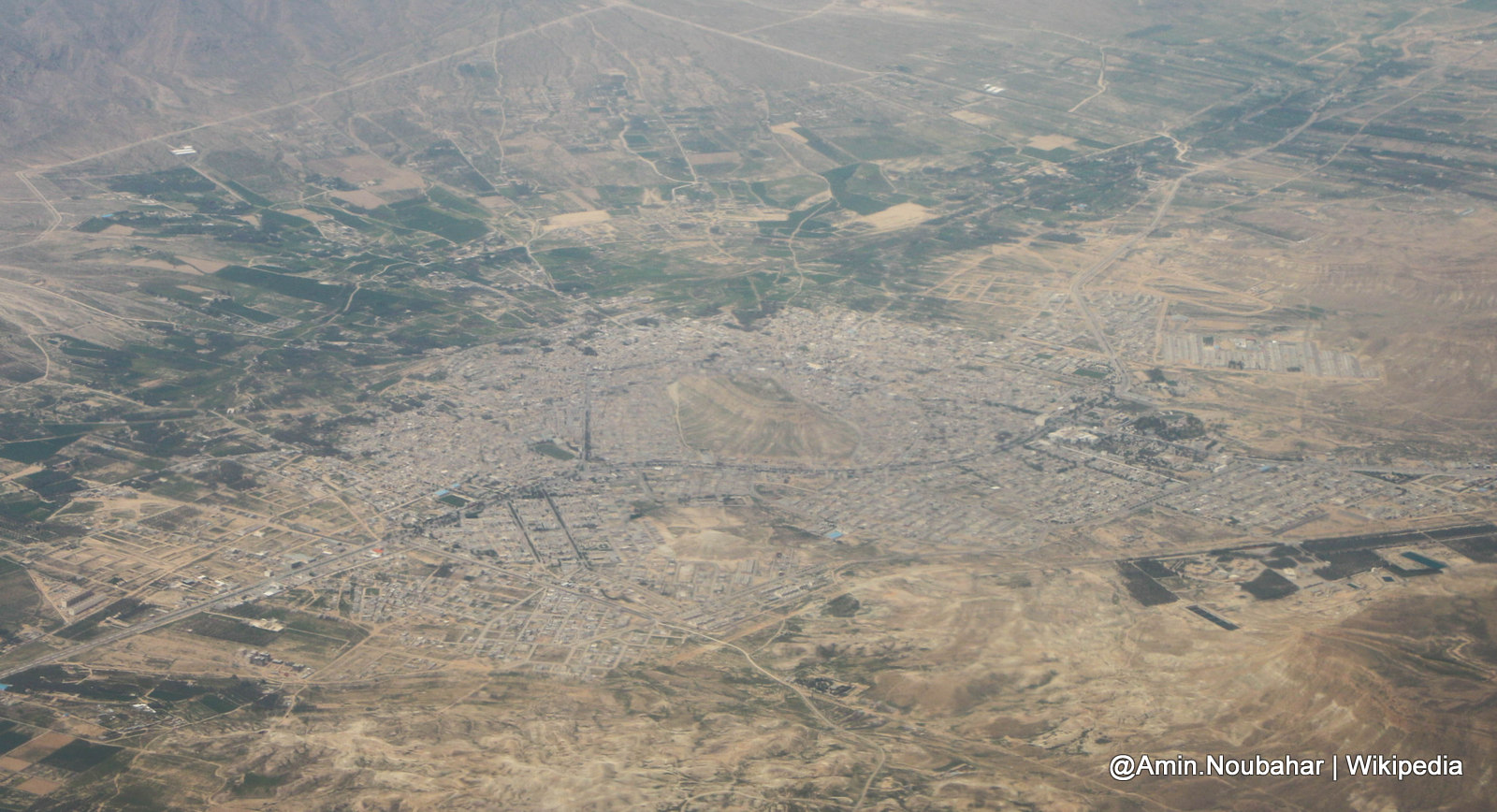 عکس از محمدامین نوبهار